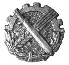 Korpusówka służb logistycznych